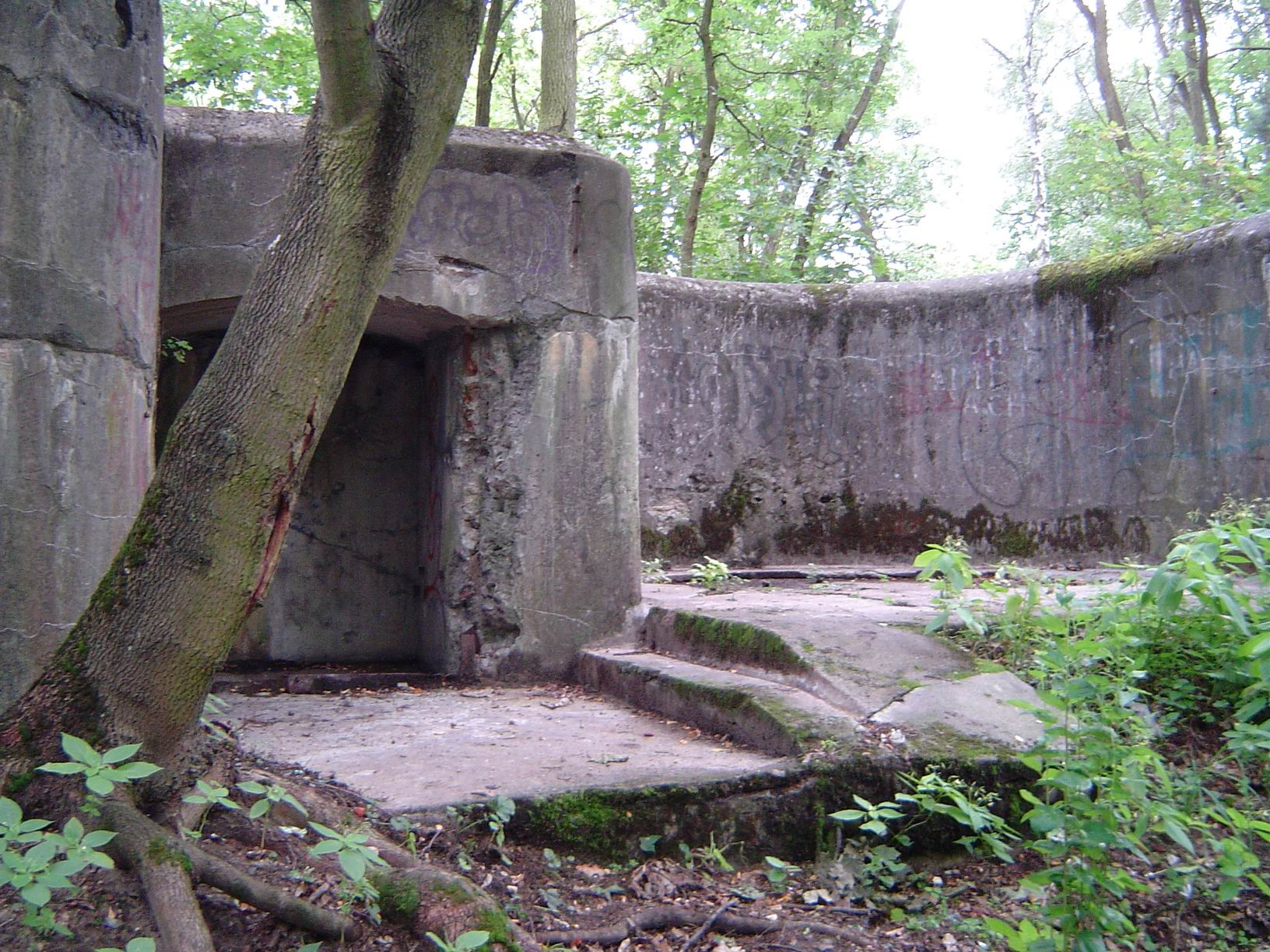 Schrony Baterii Półpancernej Leśny Dwór w Grudziądzu w stanie obecnym. Battery "Waldhof" in Grudziądz